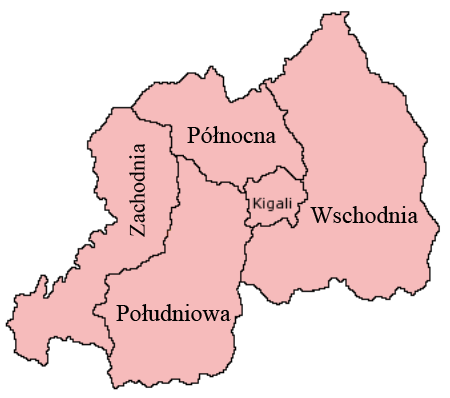 Prefektury Rwandy od 1 stycznia 2006. Wersja polska mapy, na podstawie Image:Rwanda_Provinces_2006.png